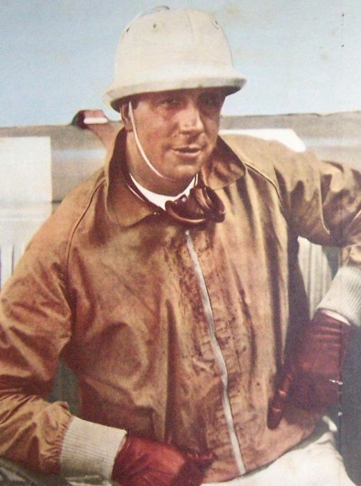 El piloto Emilio Kartulovich y su acompañante Juan Paccini, ganadores del Gran Premio Argentino de Carretera 1934, con Mercedes-Benz. Revista El Gráfico.